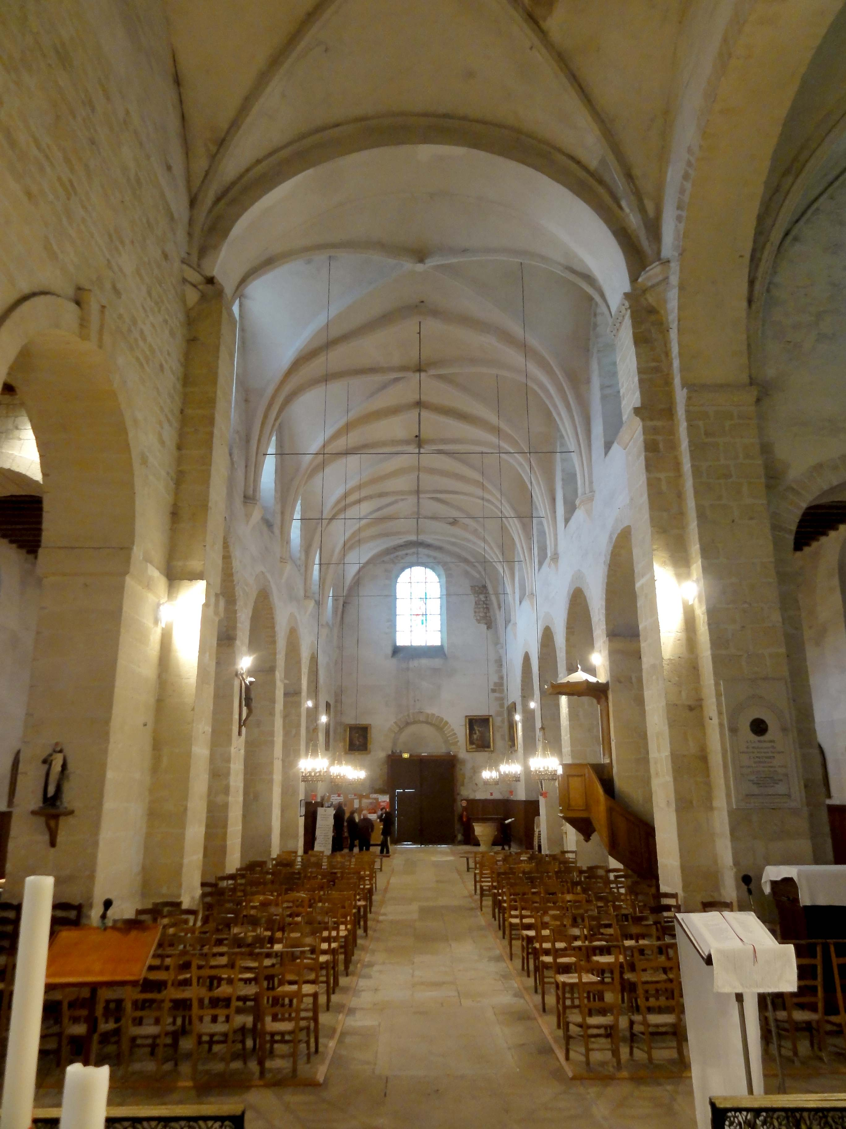 Intérieur de l'église - voir titre.